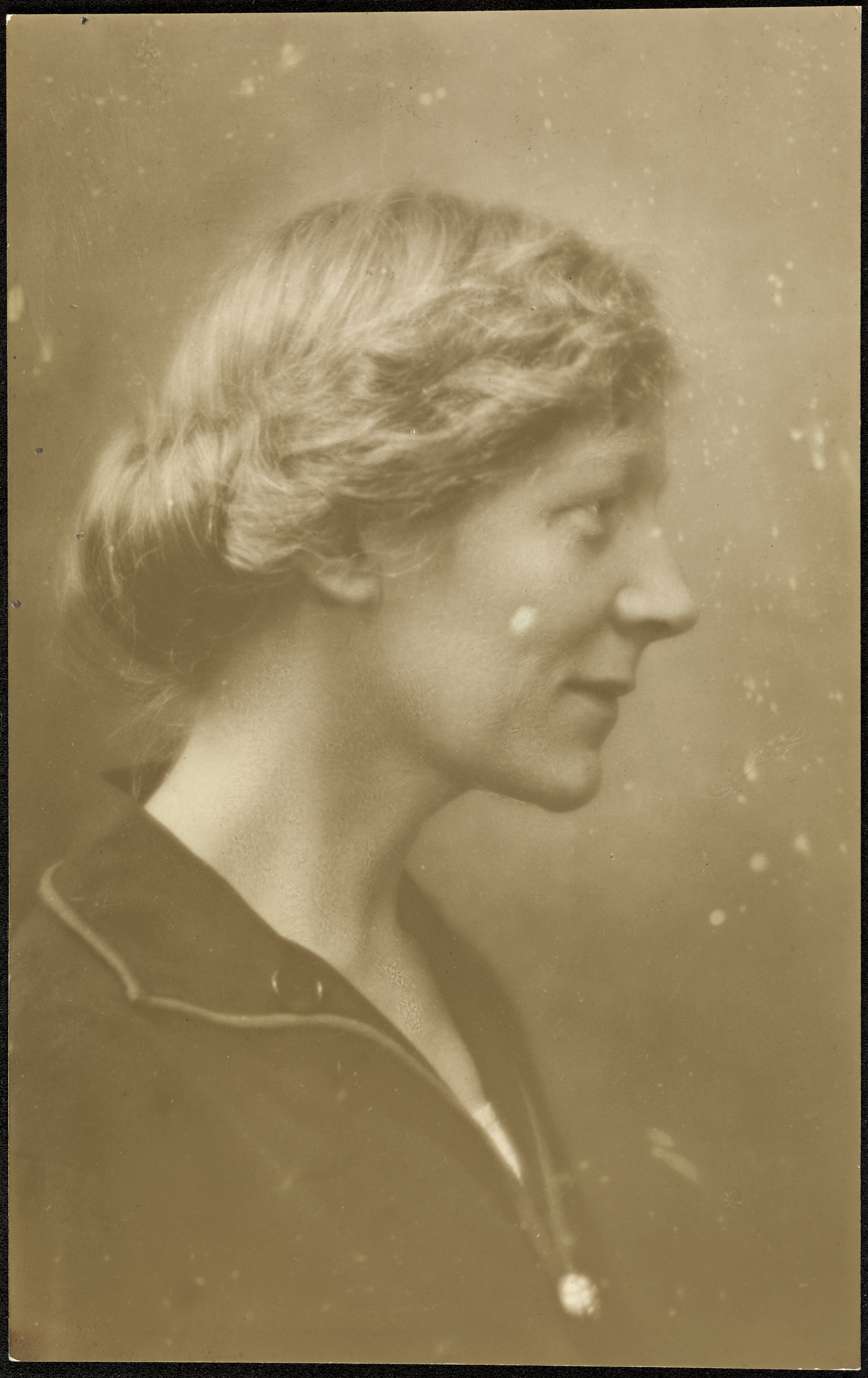 Beskrivelse / Description: Nanne Storm var pianist og musikkpedagog. Dato / Date: ukjent / unknown Fotograf / Photographer: ukjent / unknown Utgiver / Publisher: ukjent / unknown Digital kopi av original / Digital copy of original: s/h postkort, sølvgelatin Eier / Owner Institution: Nasjonalbiblioteket / National Library of Norway Lenke / Link: Bildesignatur / Image Number: blds_07468